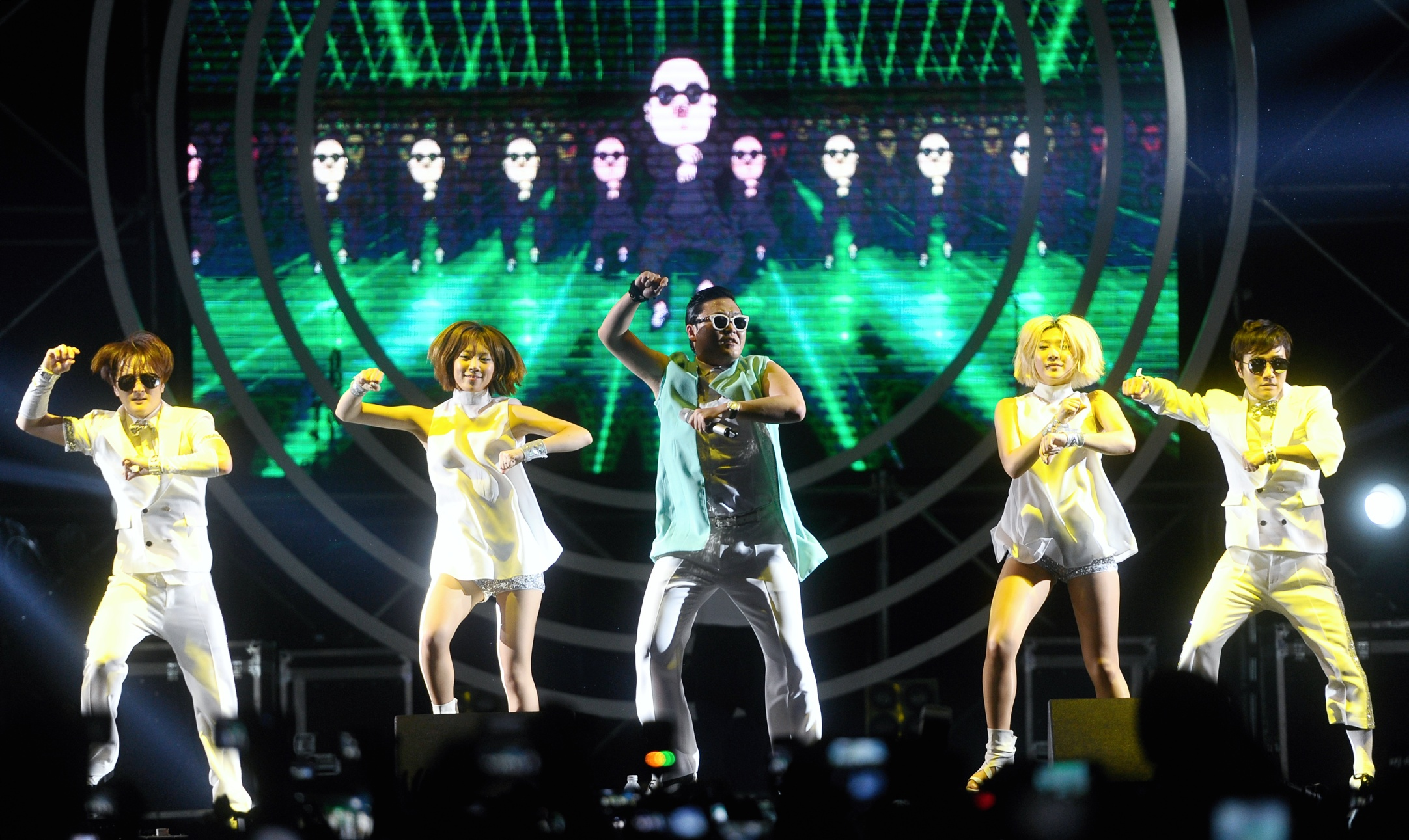 SEPANG,17/03/2013. PSY duirng Future Music Festival Asia 2013 at Sepang. Pix Firdaus Latif